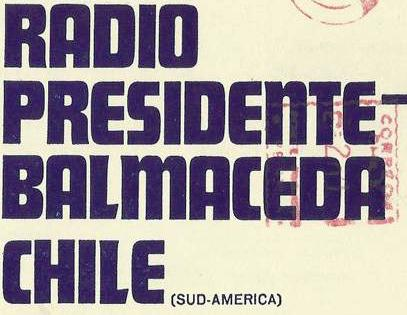 Logo de la Radio Presidente Balmaceda (Chile)